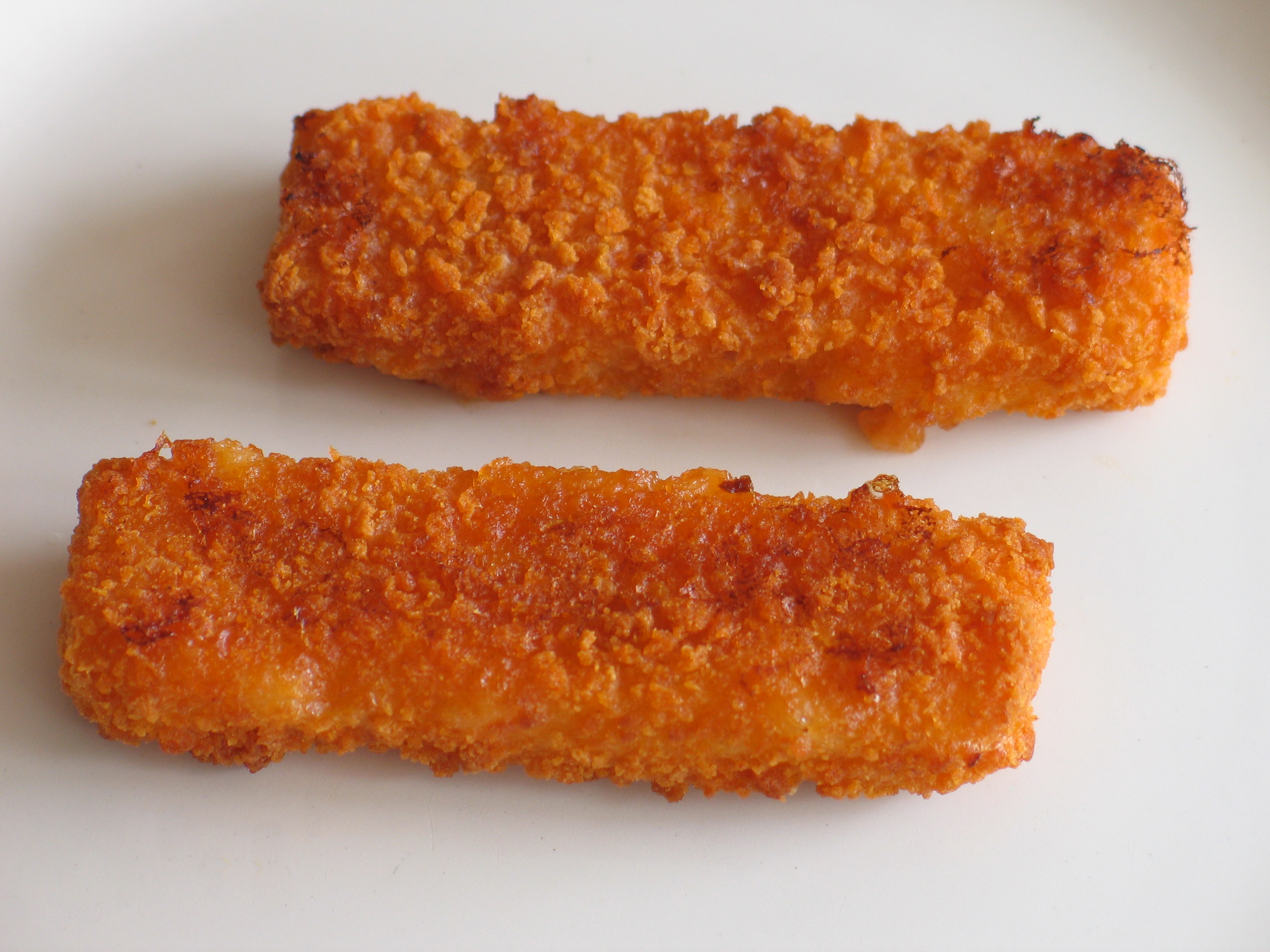 Fried Fishfinger